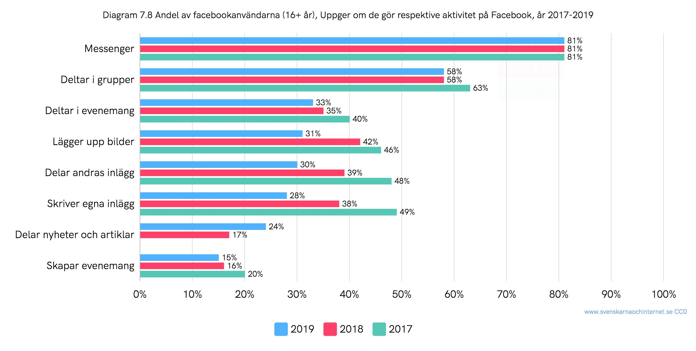 Andel av Facebookanvändarna (16+ år) som gör respektive aktivitet på Facebook, år 2017–2019. Siffror från undersökningen "Svenskarna och internet".